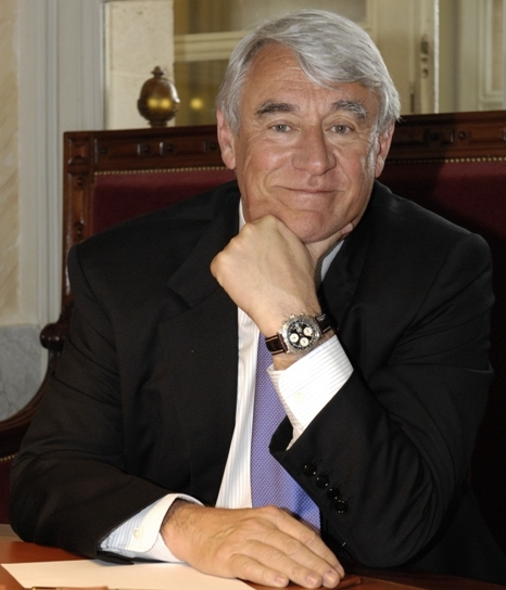 Claude Goasguen